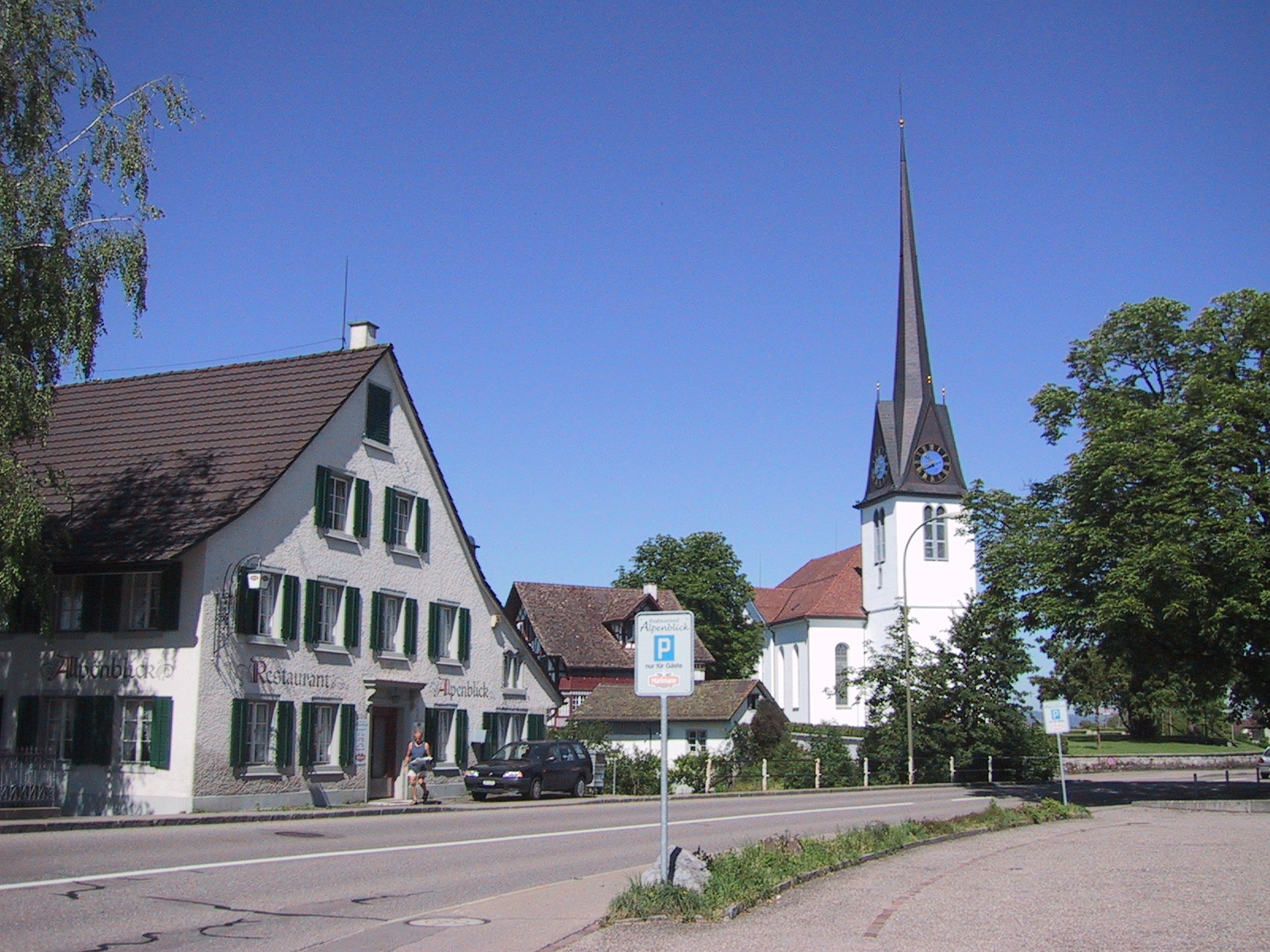 Kirche von Gossau ZH